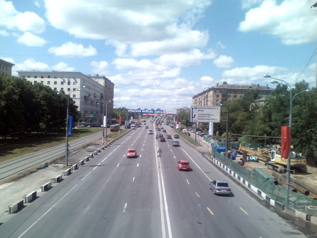 Москва, вид сверху на Волоколамское шоссе в районе «Сокол».